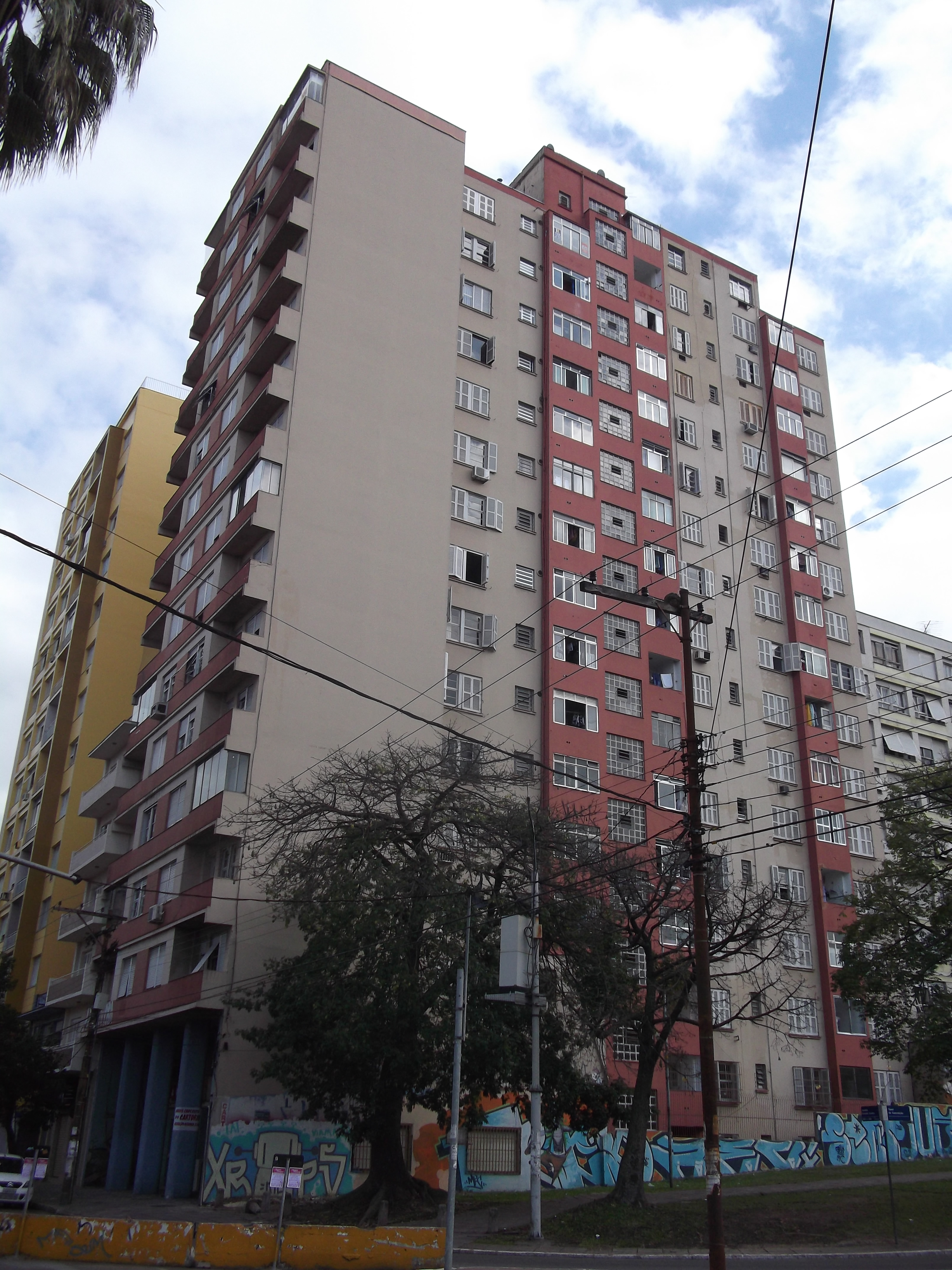 Edifício Caraíba, na Avenida Oswaldo Aranha n.° 232, em Porto Alegre, Brasil. Bairro Bom Fim.